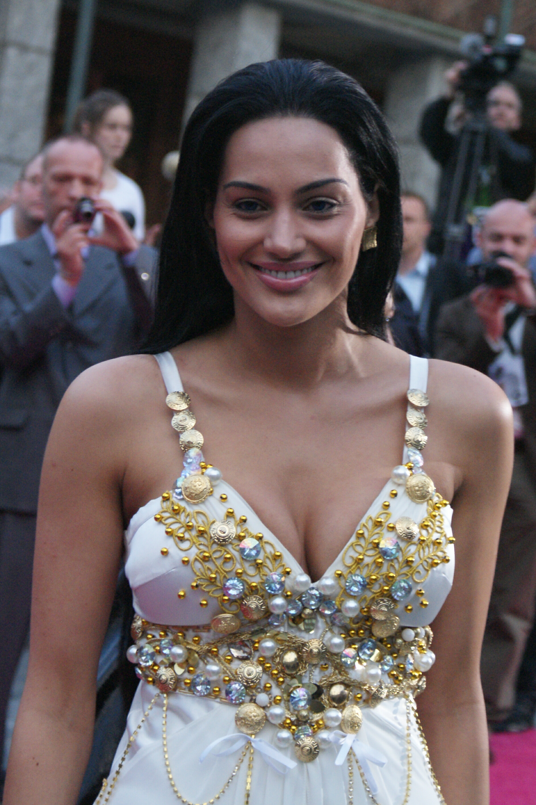 Eva Rivas